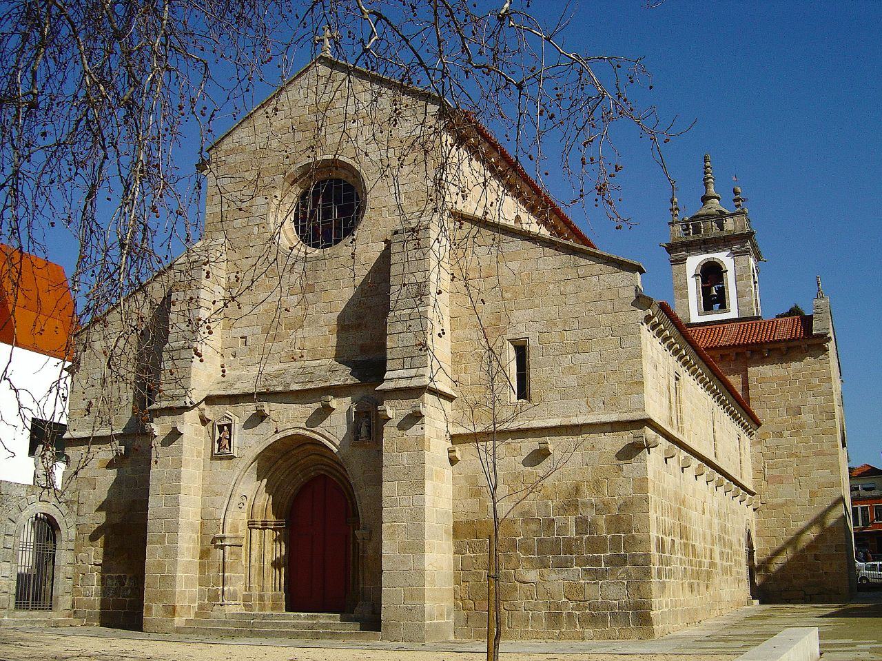 Igreja Matriz